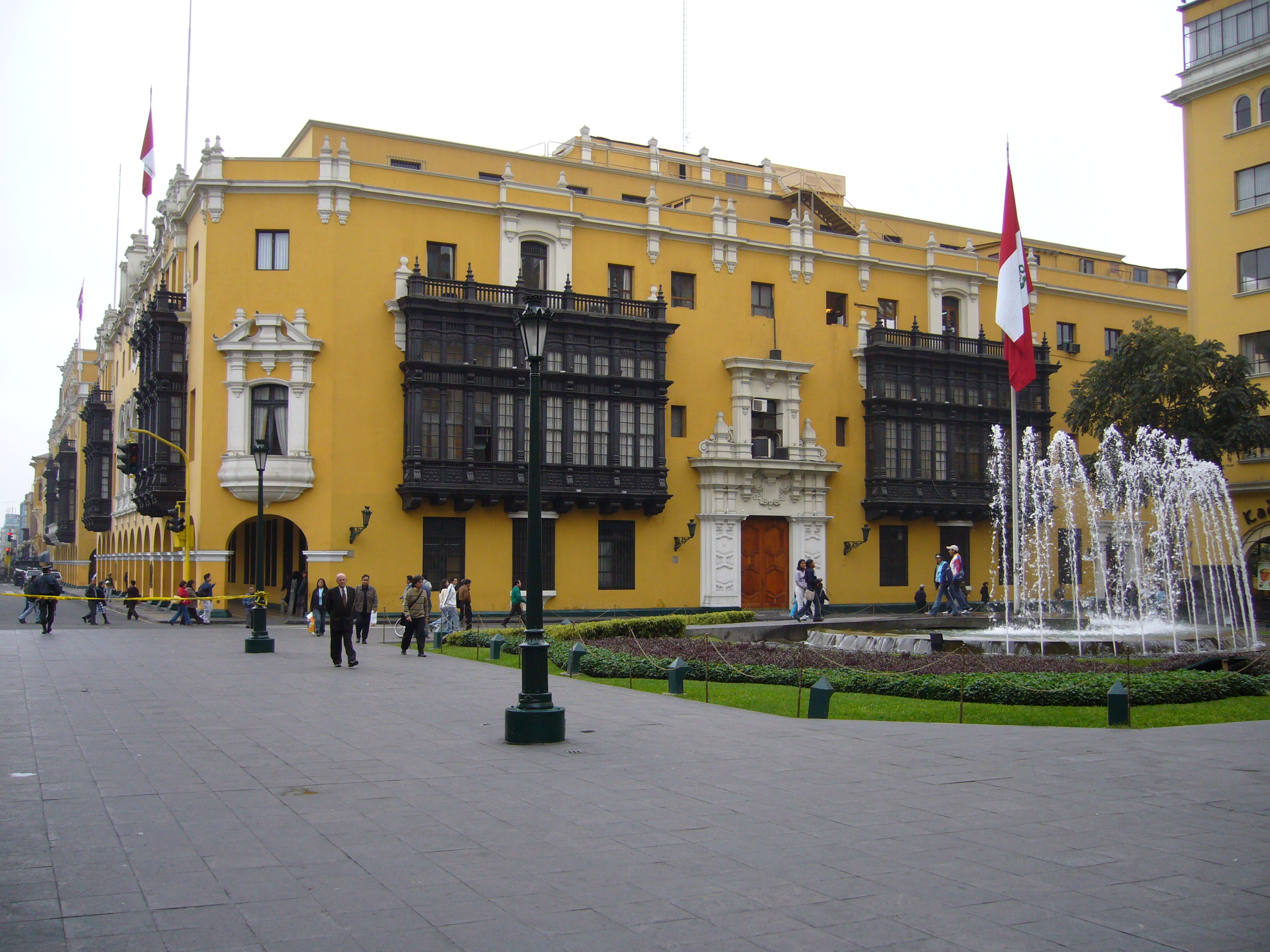 Descripción: Lateral izquierdo de la Municipalidad de Lima Lugar: Centro Histórico de Lima Distrito : Cercado de Lima Ciudad : Lima País : Perú Fotógrafo: © Manuel González Olaechea y Franco Fecha de la foto : 11 de julio de 2007